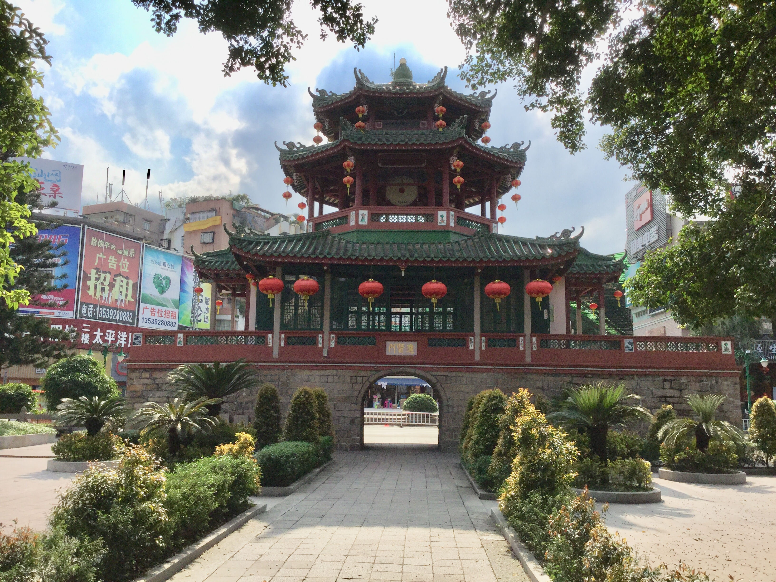 中文（中国大陆）: 揭阳进贤门城楼